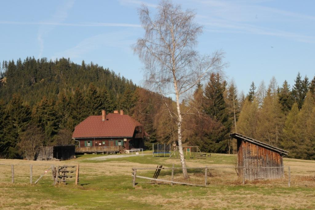 Hochanger Schutzhaus